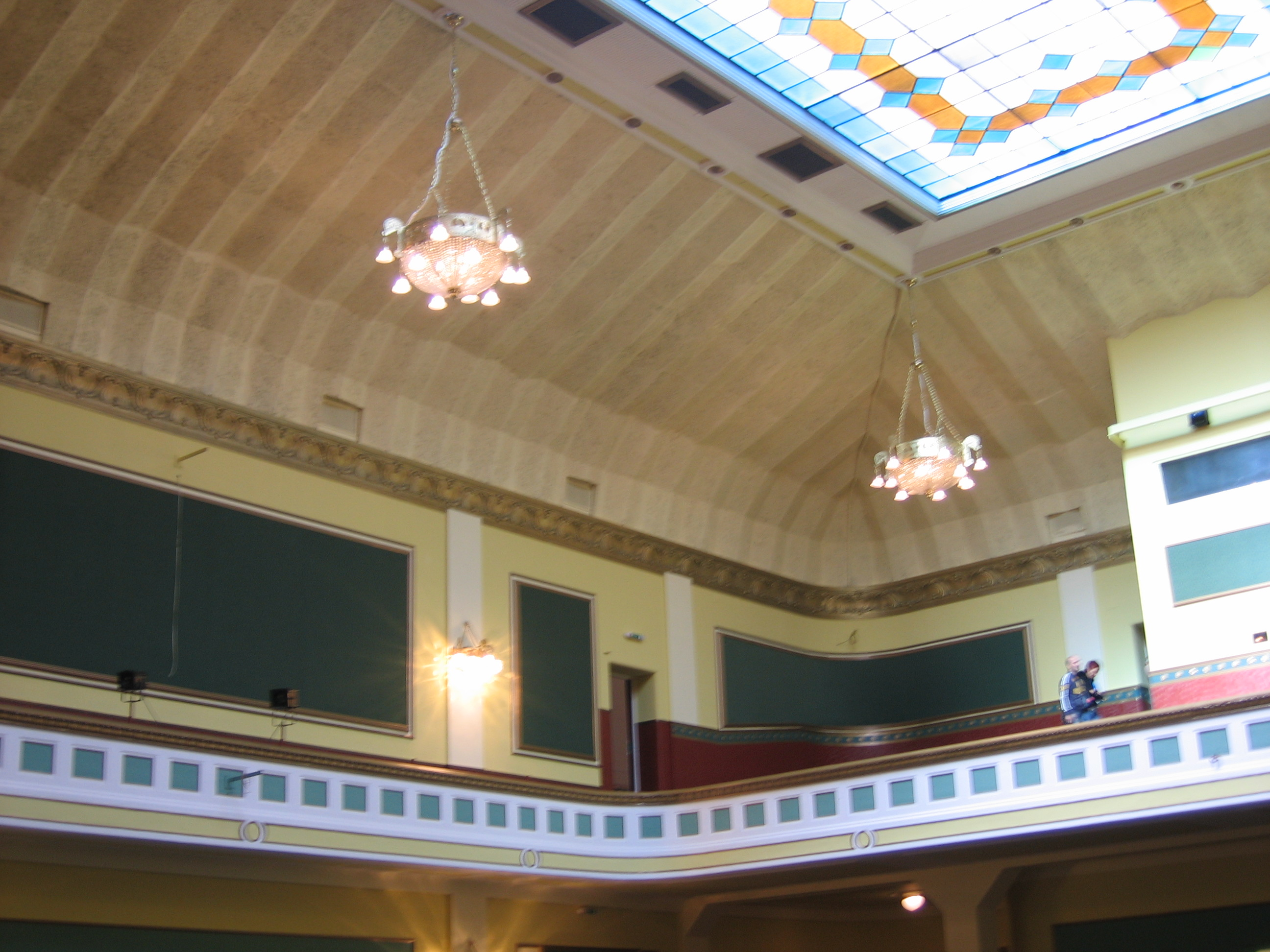 Az előadóterem teteje részben üvegből készült